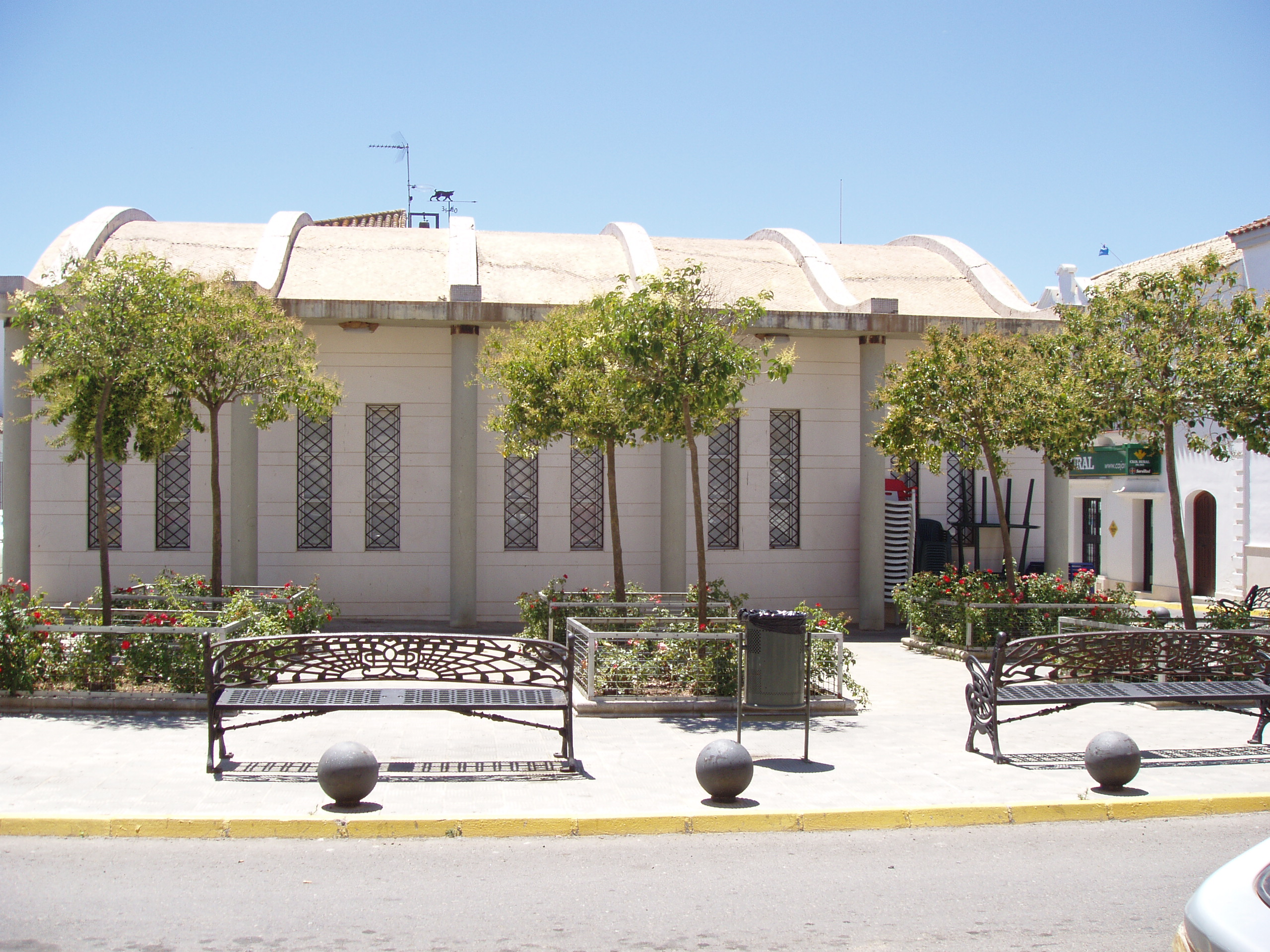 Polideportivo de La Redondela